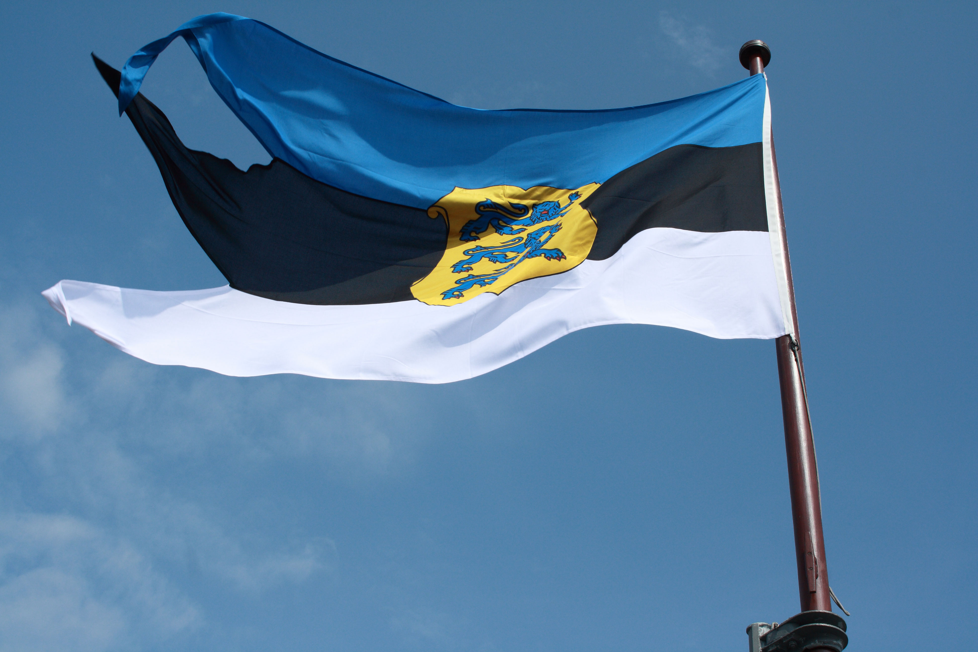 Eesti mereväe lipp Admiral Cowani pardal